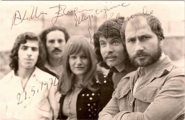 Atilla Engin arşivinden